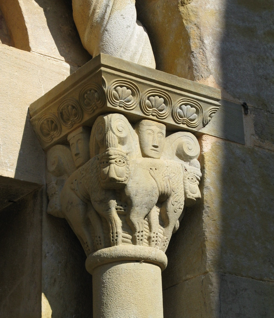 Sant Salvador de Bianya (Capital at Church Romanesque, Val de Bianya, Catalunya, Spain)